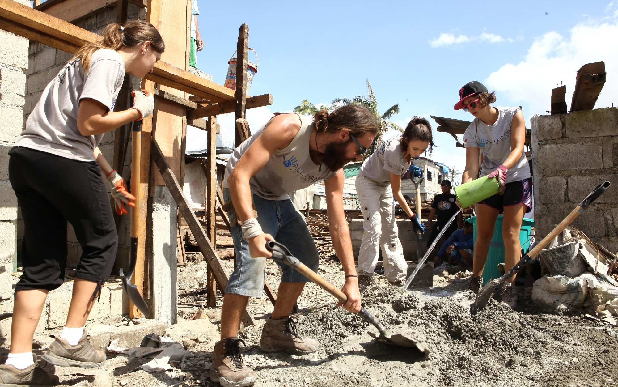 Kulczyk Foundation z wraz z wolontariuszami usuwała skutki tajfunu na wyspie Leyte_fot. Tatiana Jachyra